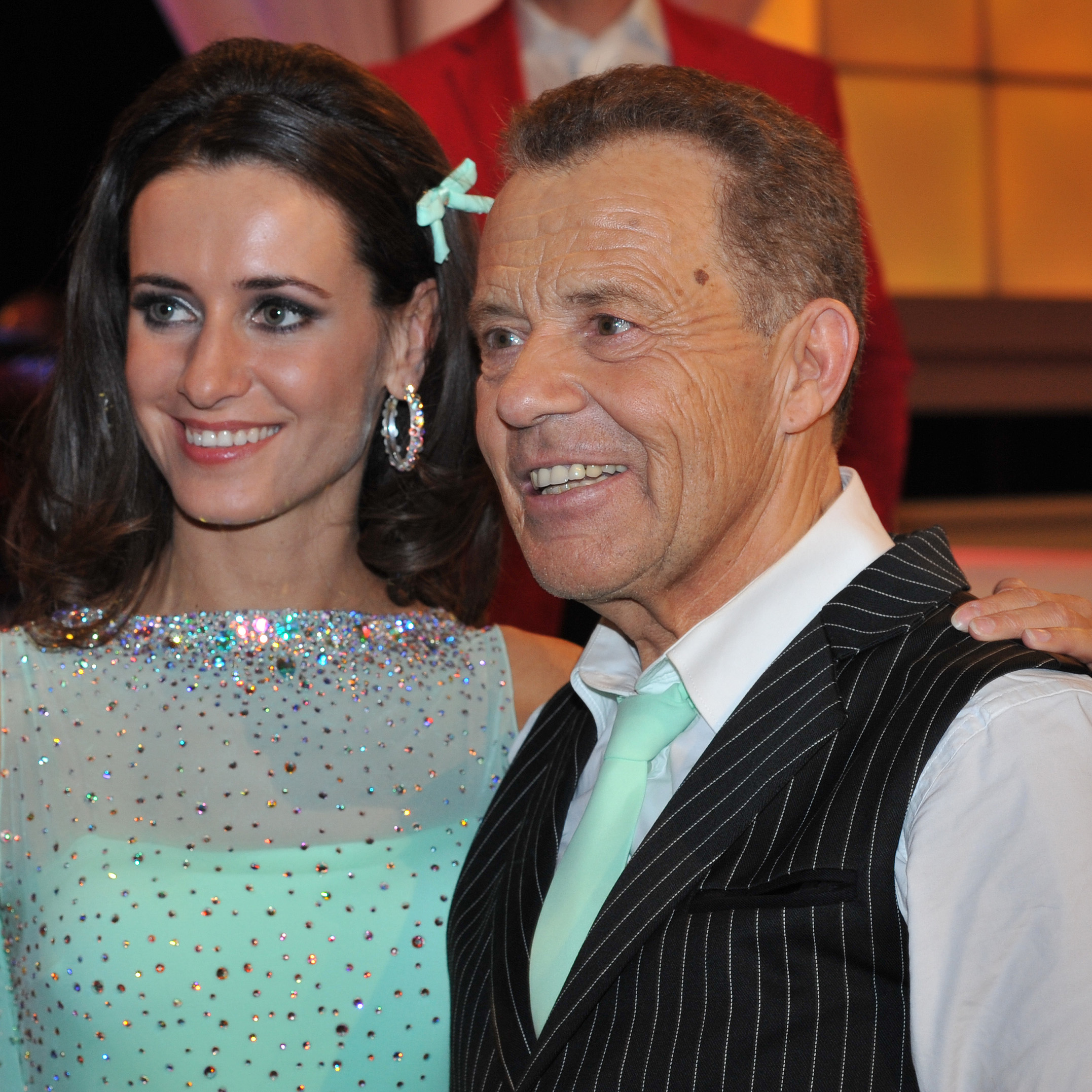 "Dancing Stars" am 7. März 2014: Erik Schinegger und Lenka Pohoralek